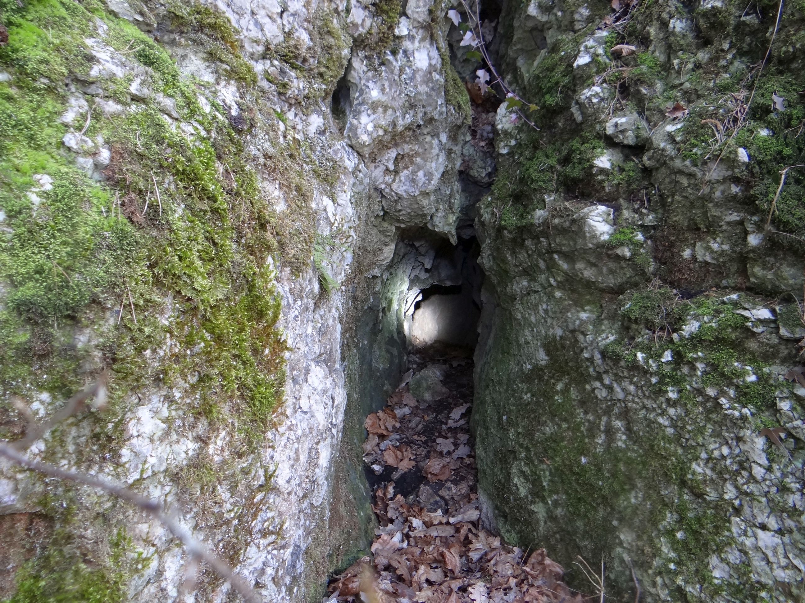 Tunel Ciasny na Tomaszówkach Dolnych